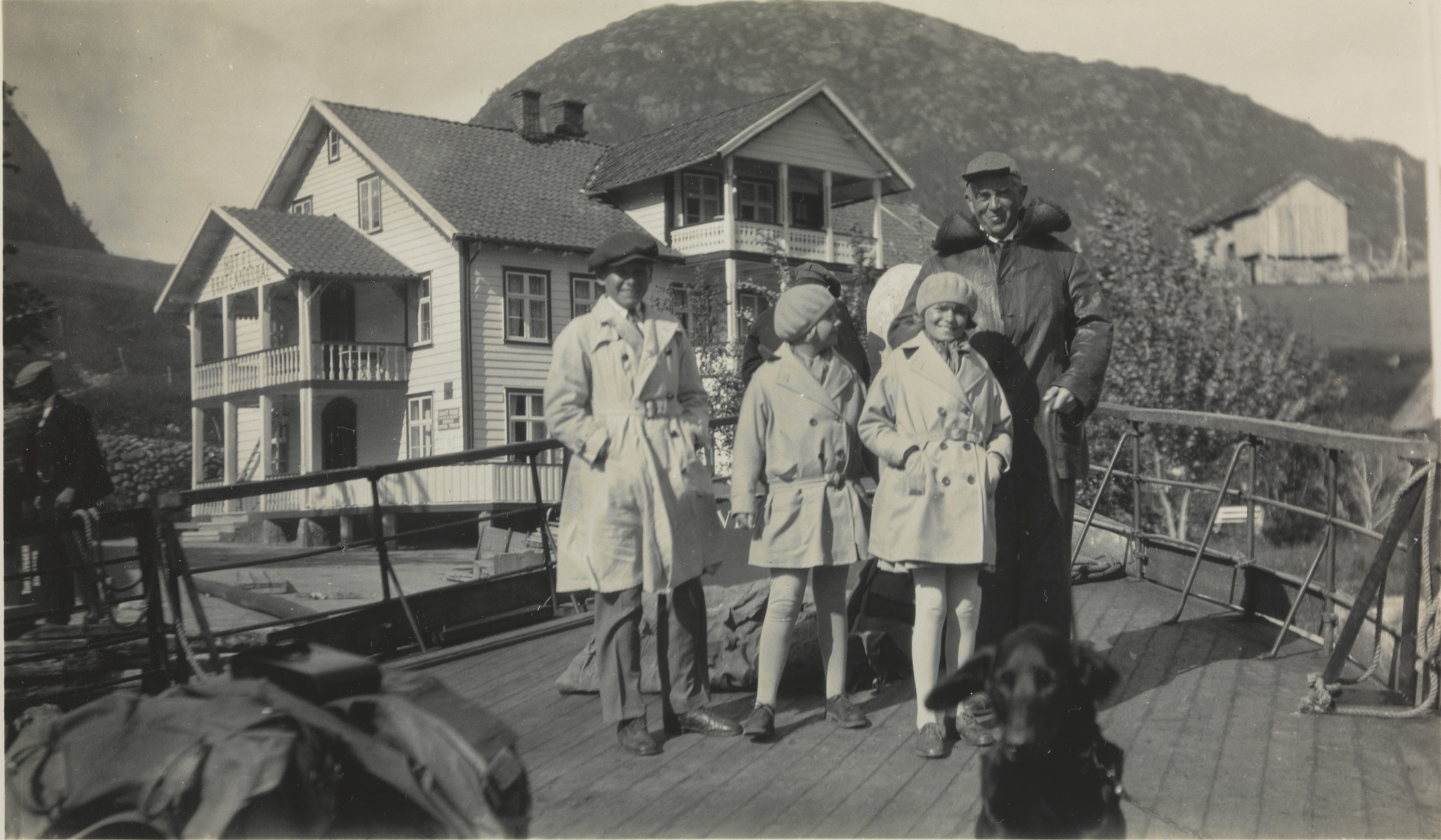 Barna til Walle-Hansen om bord i en båt utenfor Hotel Bratlandsdal. Fra venstre Hans-Jørgen og søstrene Evy og Aniti. Depicted person: Walle-Hansen, Hans-Jørgen Depicted person: Walle-Hansen, Evy Depicted person: Walle-Hansen, Aniti Depicted place: Telemark